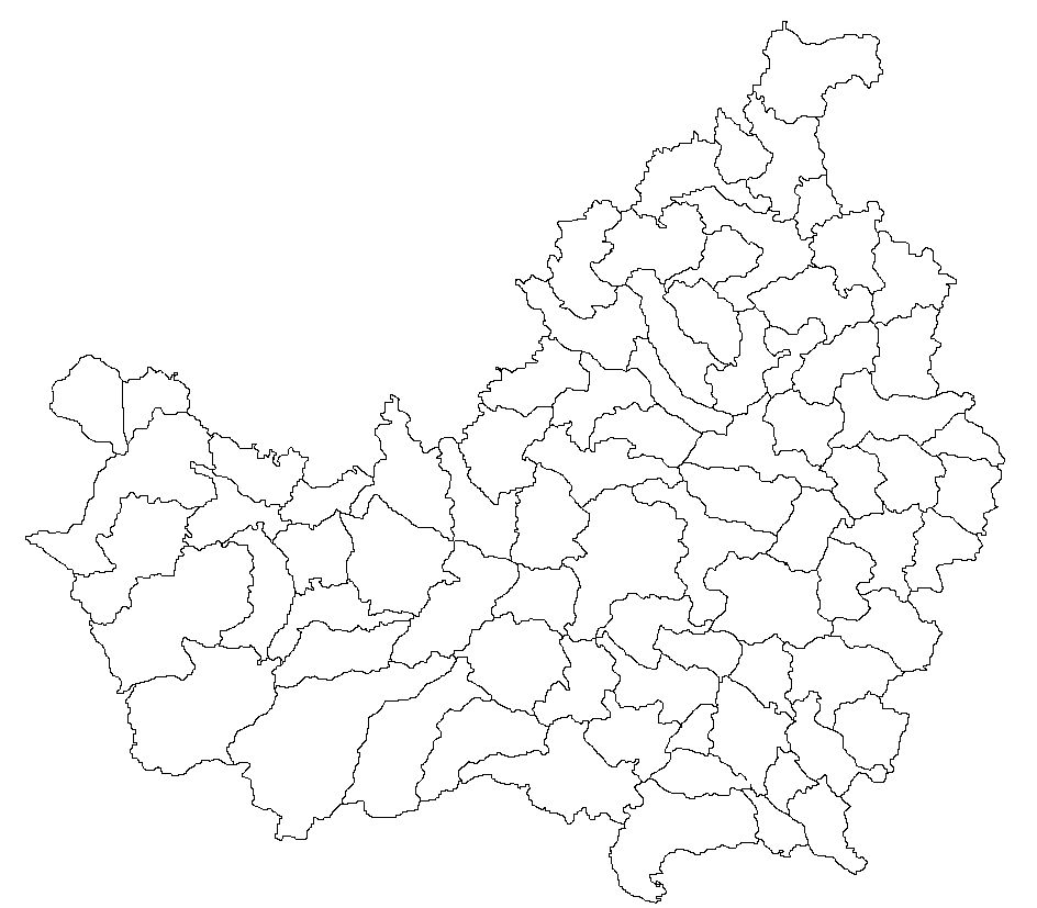 Categorie:Hărţi ale judeţului Cluj